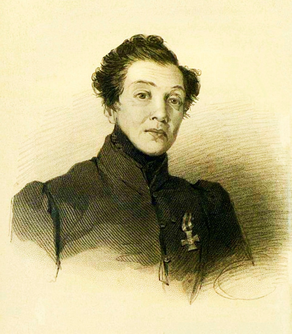 Надежда Дурова; литография. Данное изображение было также использовано для иллюстрирования статьи «Дурова, Надежда Андреевна» опубликованной в девятом томе «Военной энциклопедии», который был издан книгоиздательским товариществом Ивана Дмитриевича Сытина в 1912 году в столице Российской империи городе Санкт-Петербурге.